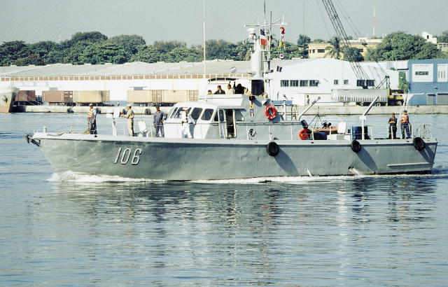 Dominican Republic Coast Guard vessel Bellatrix (GC-106)